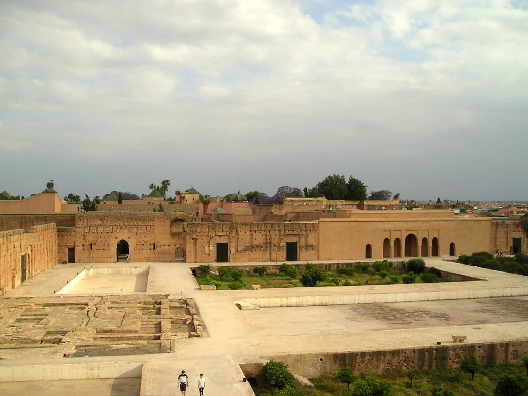 El Badi Palace